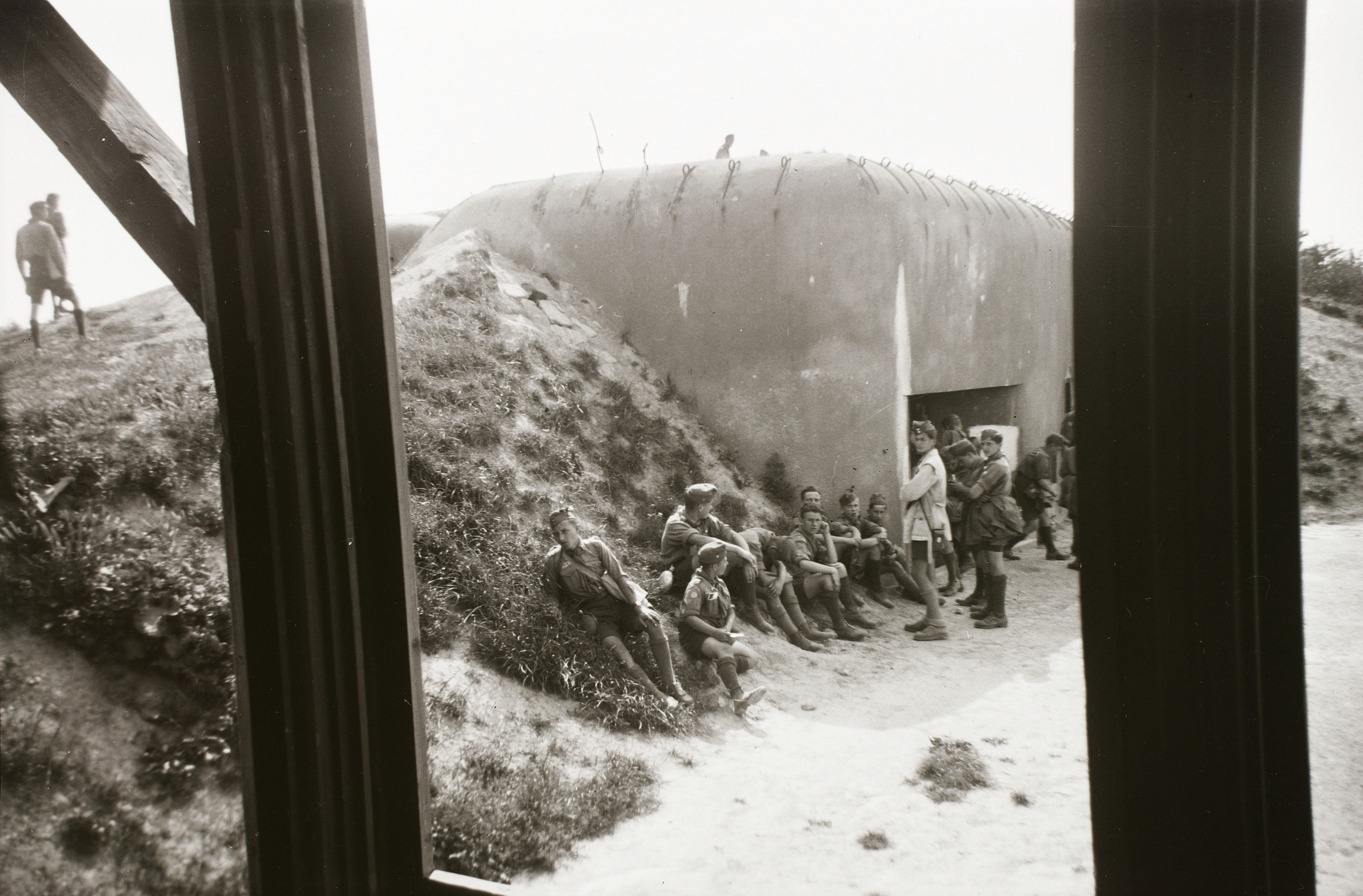 csehszlovák erőd. A felvétel a Felvidék visszacsatolása után, a Budai Ciszterci Szent Imre Gimnázium cserkészcsapatának kirándulásán készült. Location: Slovakia Tags: scouting, fort Title: csehszlovák erőd. A felvétel a Felvidék visszacsatolása után, a Budai Ciszterci Szent Imre Gimnázium cserkészcsapatának kirándulásán készült.